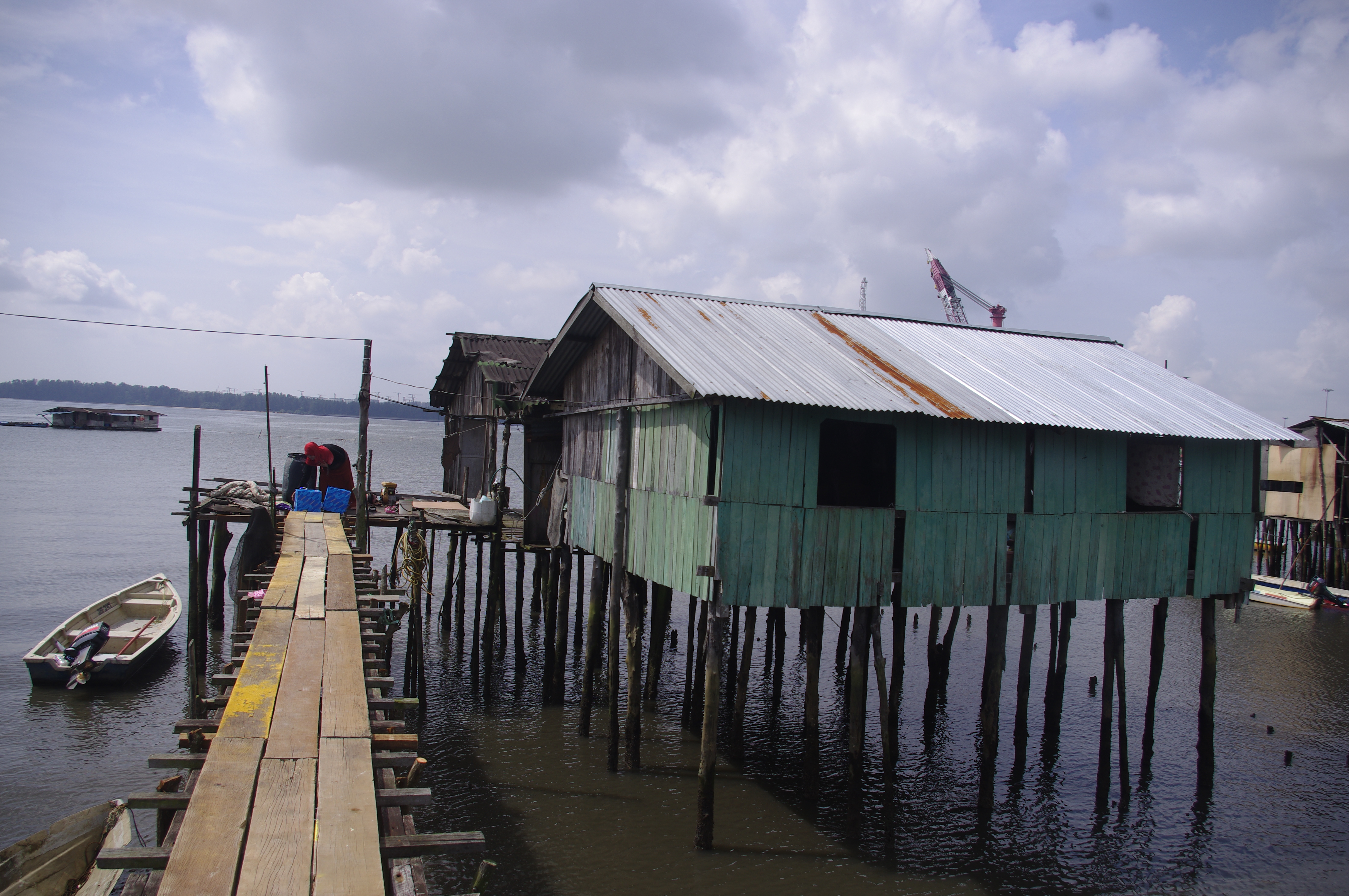 Orang Seletar